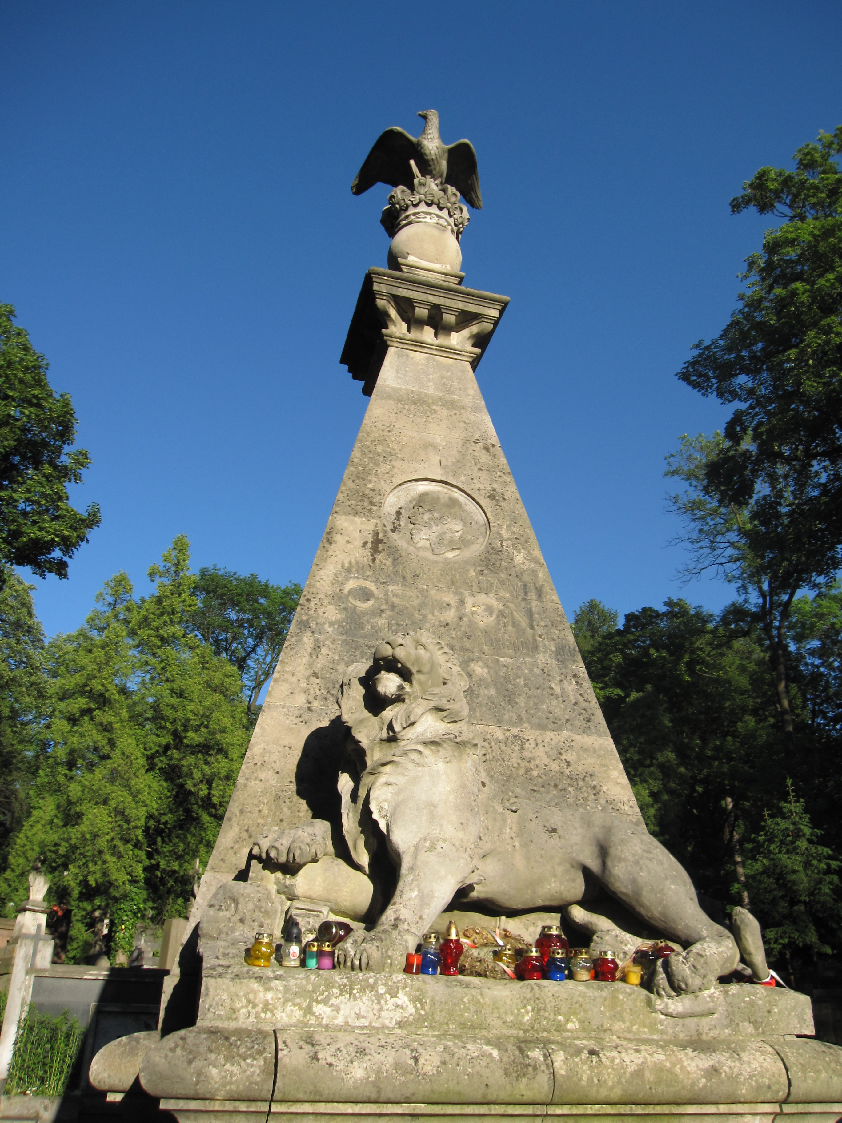 Łyczaków Cemetery in Lviv, Ukraine.